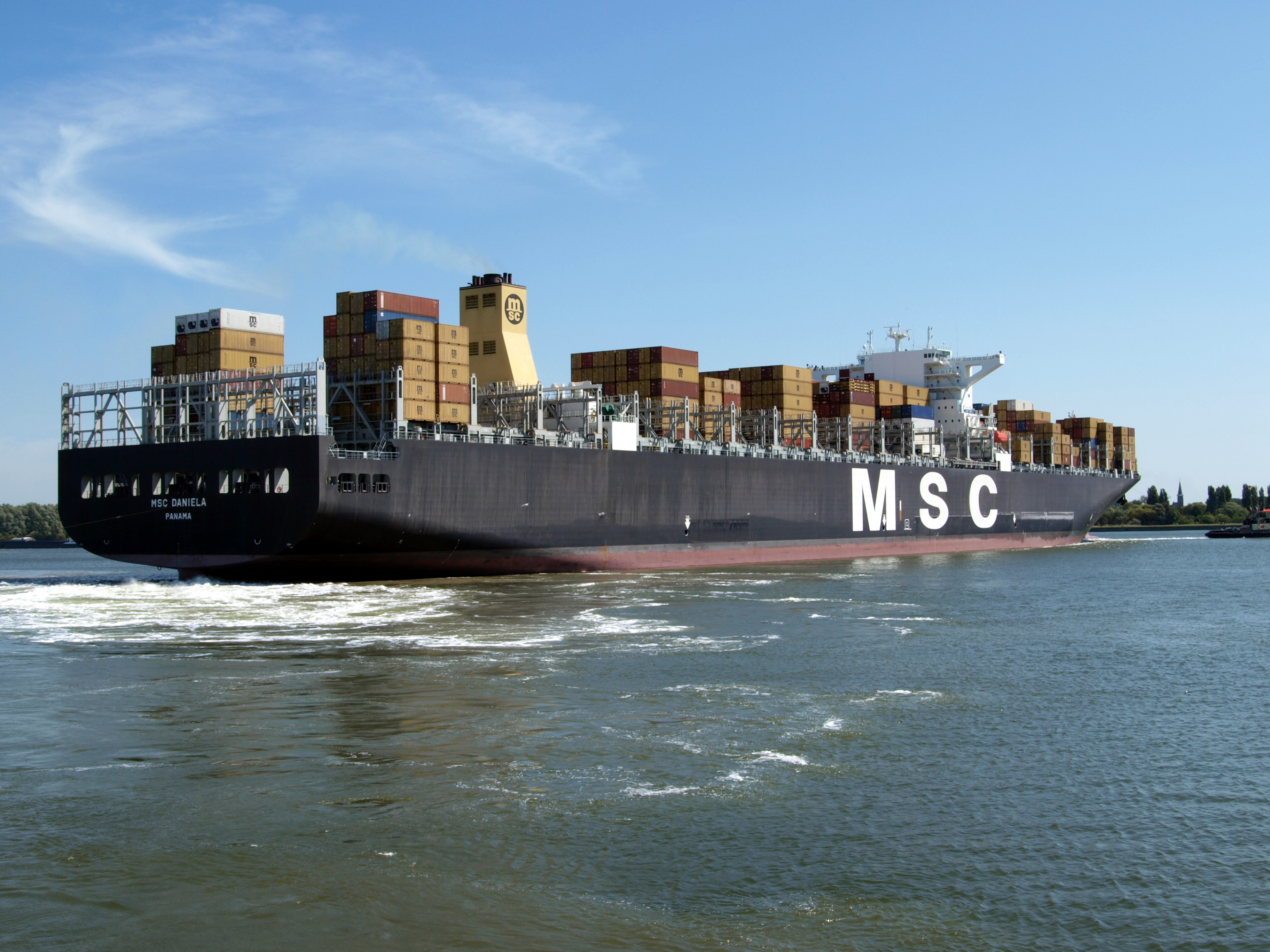 MSC Daniela - IMO 9399002 - Callsign 3FIA2